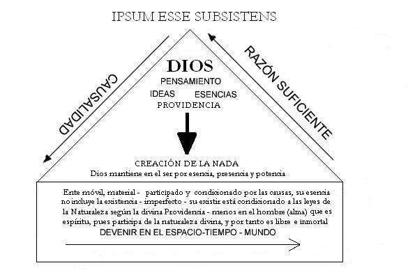 Modelo representativo del Ser de Dios y el Mundo en la filosofía aristotélico-tomista